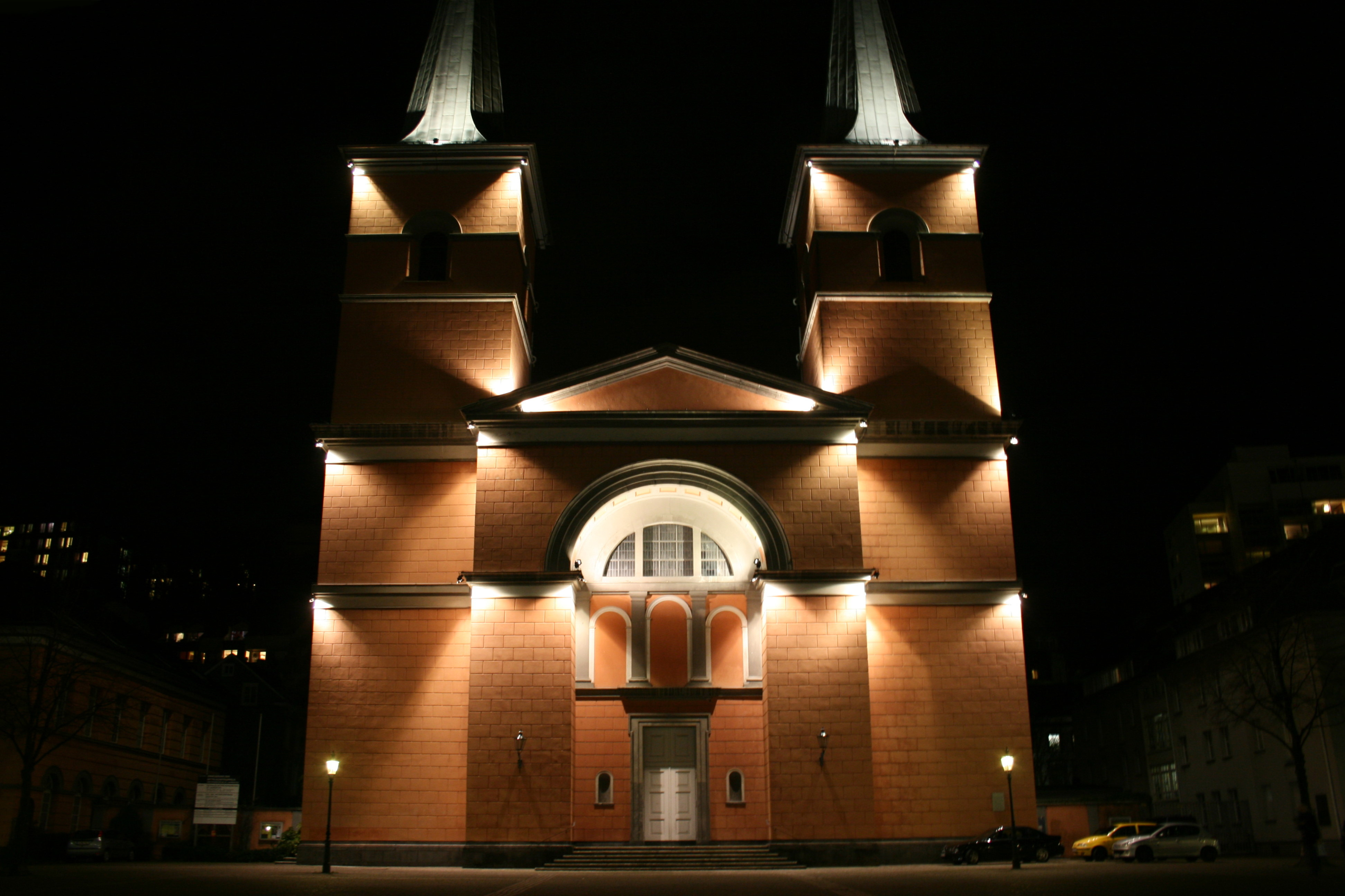 Sankt Laurentius in Wuppertal